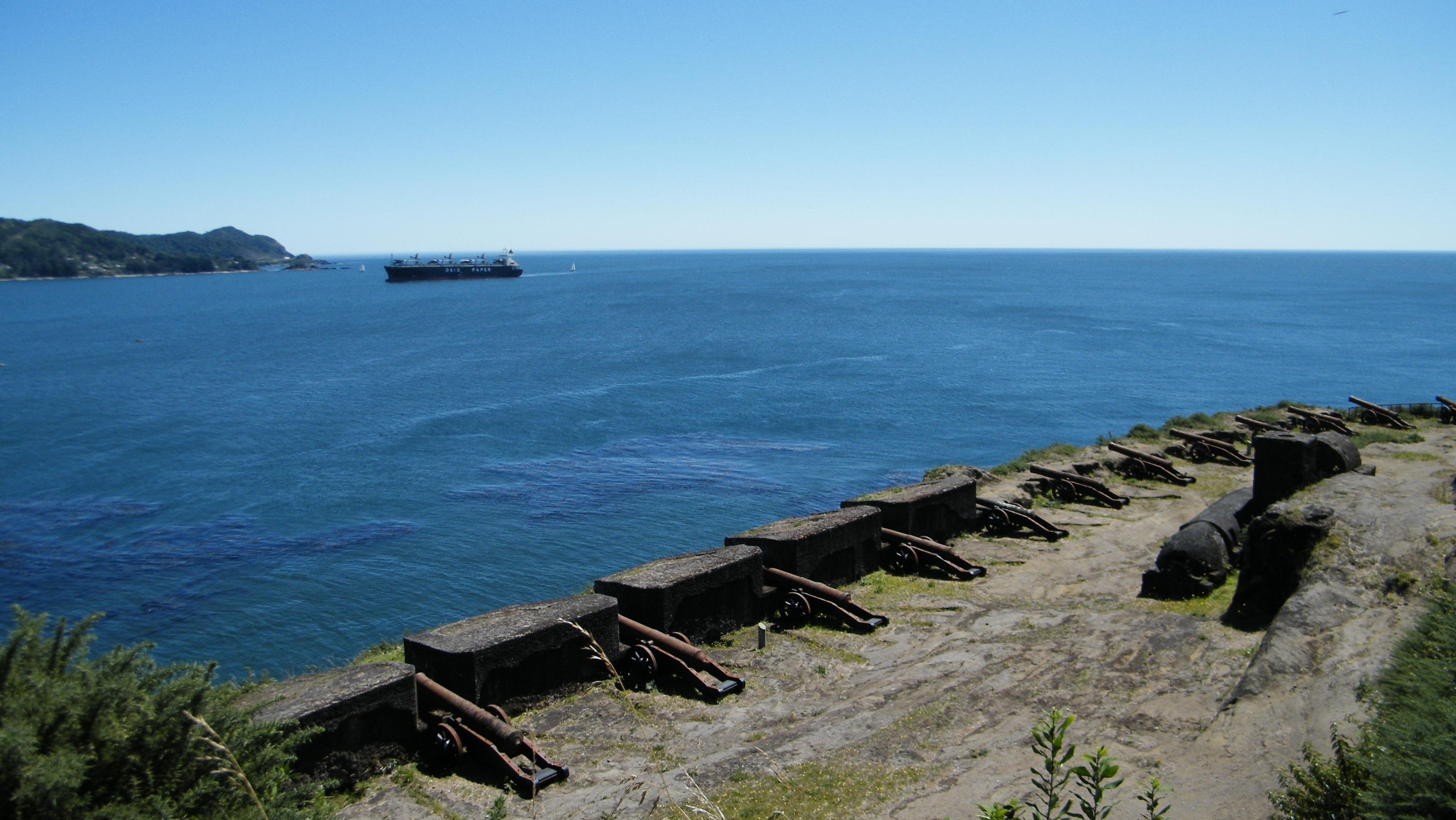 Castillo de Niebla This is a photo of a national monument in Chile: 170